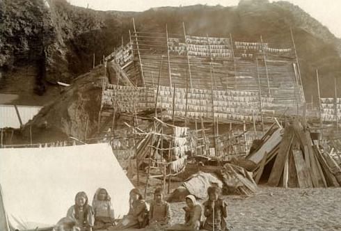 Makah Indians, circa 1900.